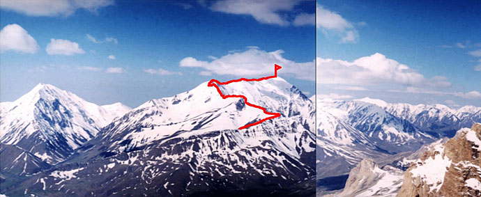 Bazardüzü